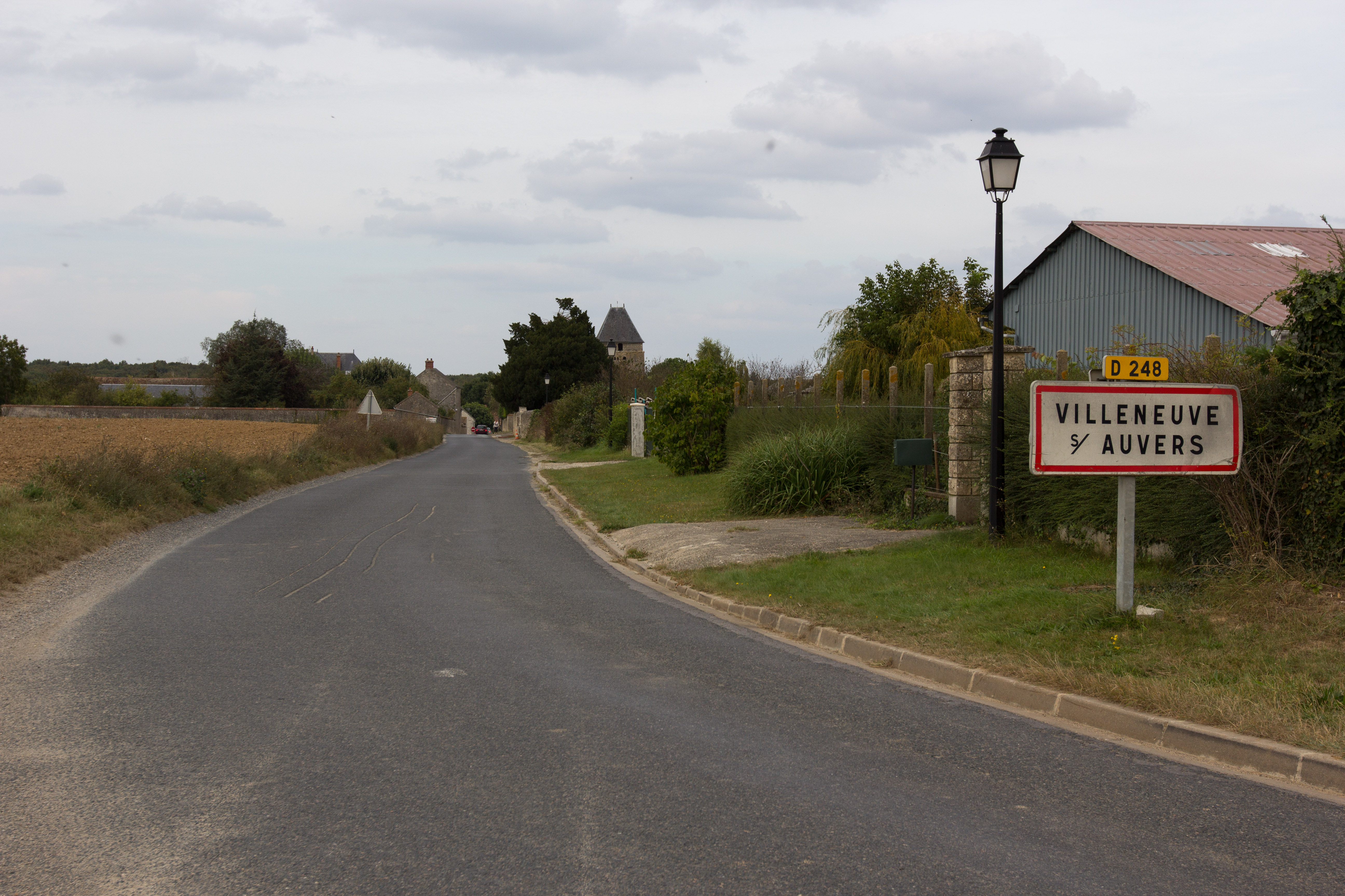 Entrée Sud de Villeneuve-sur-Auvers / Rue Thomas Becket (Départementale 248) / Villeneuve-sur-Auvers / Essonne / France